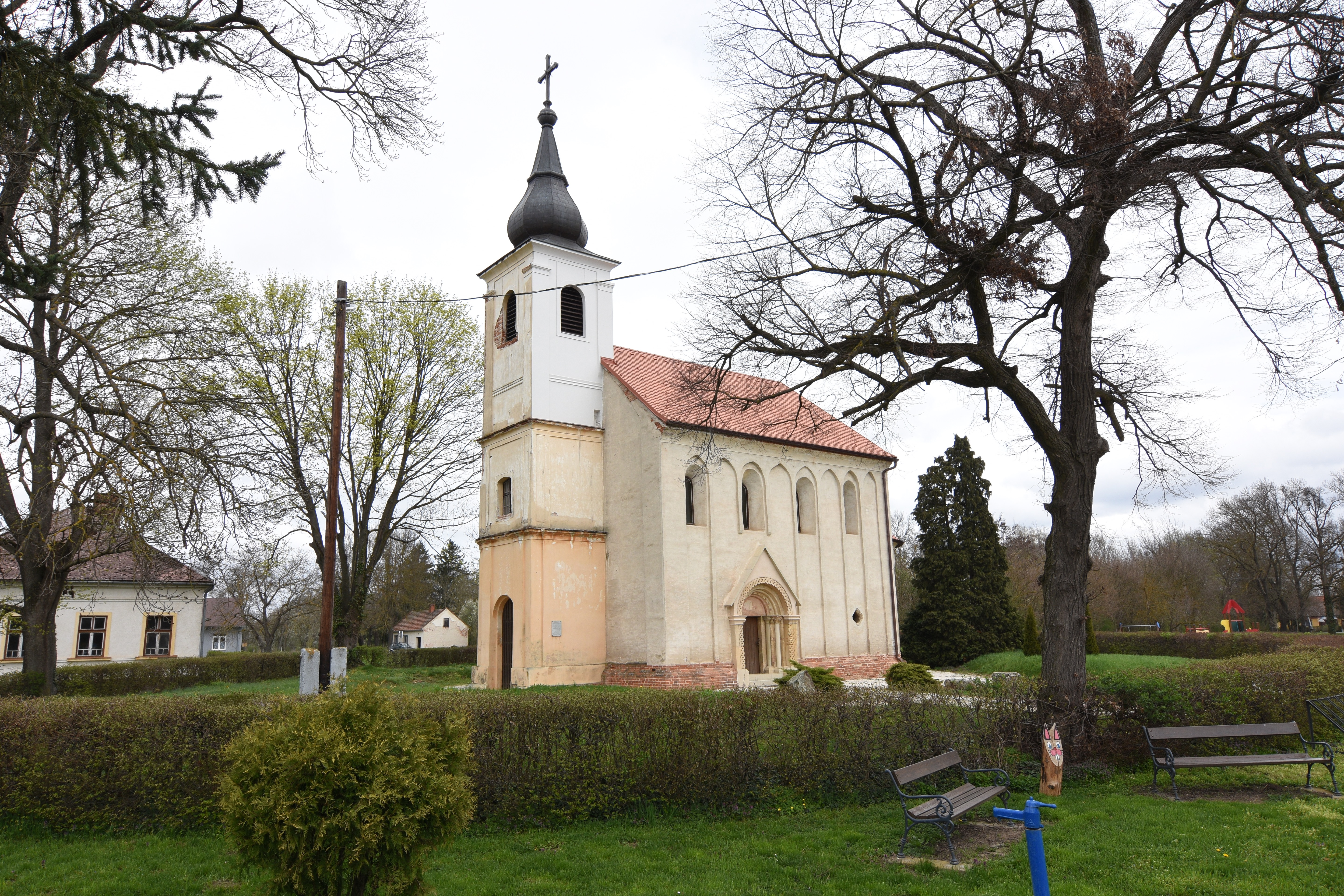 Kisboldogasszony templom, Egyházasszecsőd